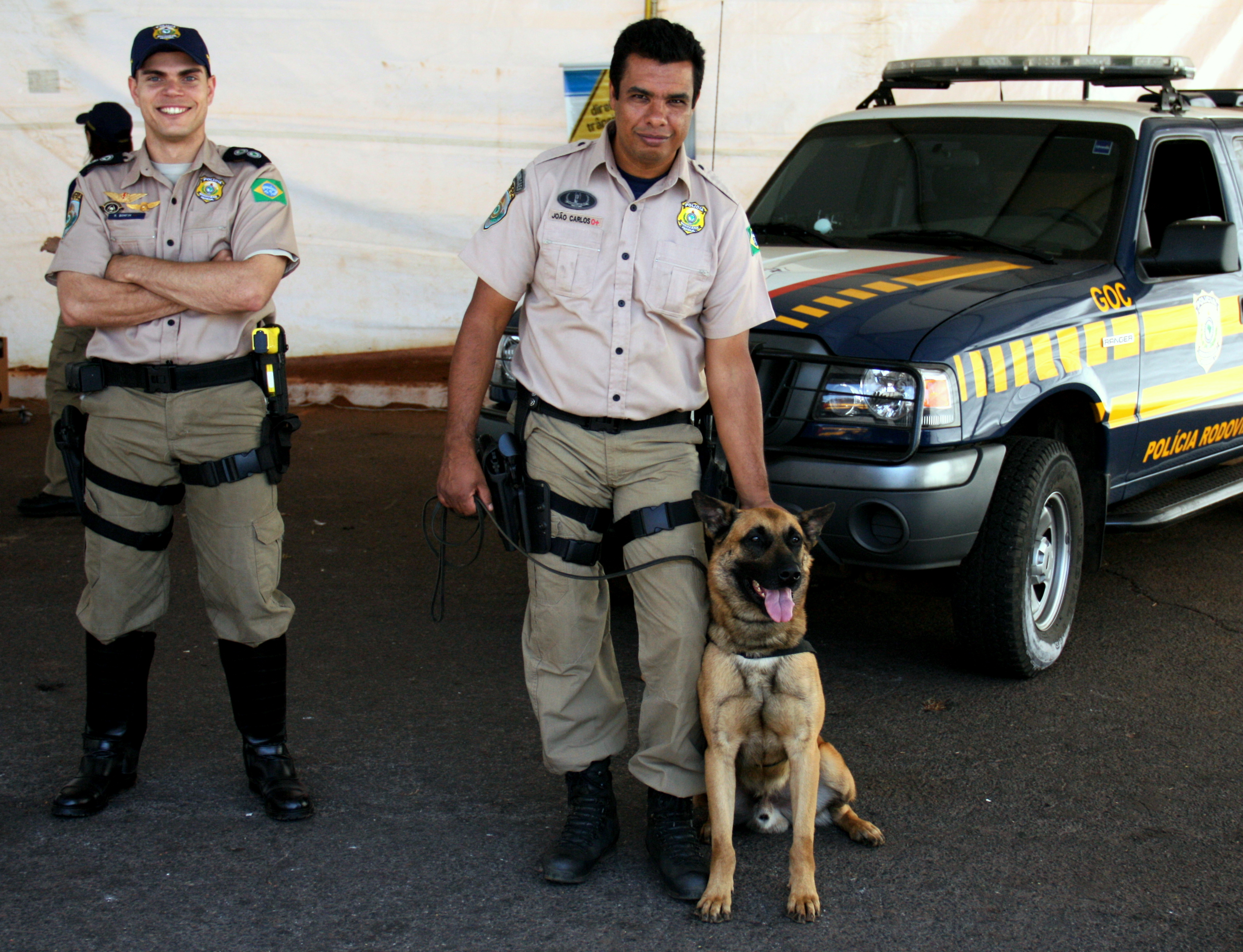 Grupo de Operações com Cães Departamento de Polícia Rodoviária Federal